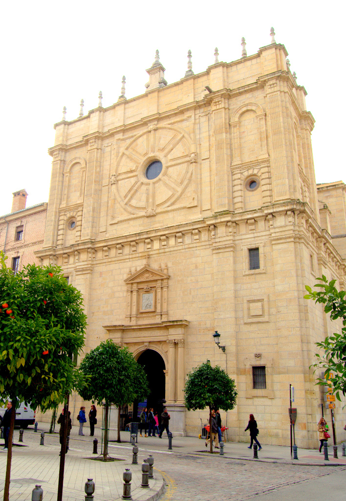 Melchor de Aguirre y taller, Oratorio de San Felipe Neri de Granada, 1685-1752.